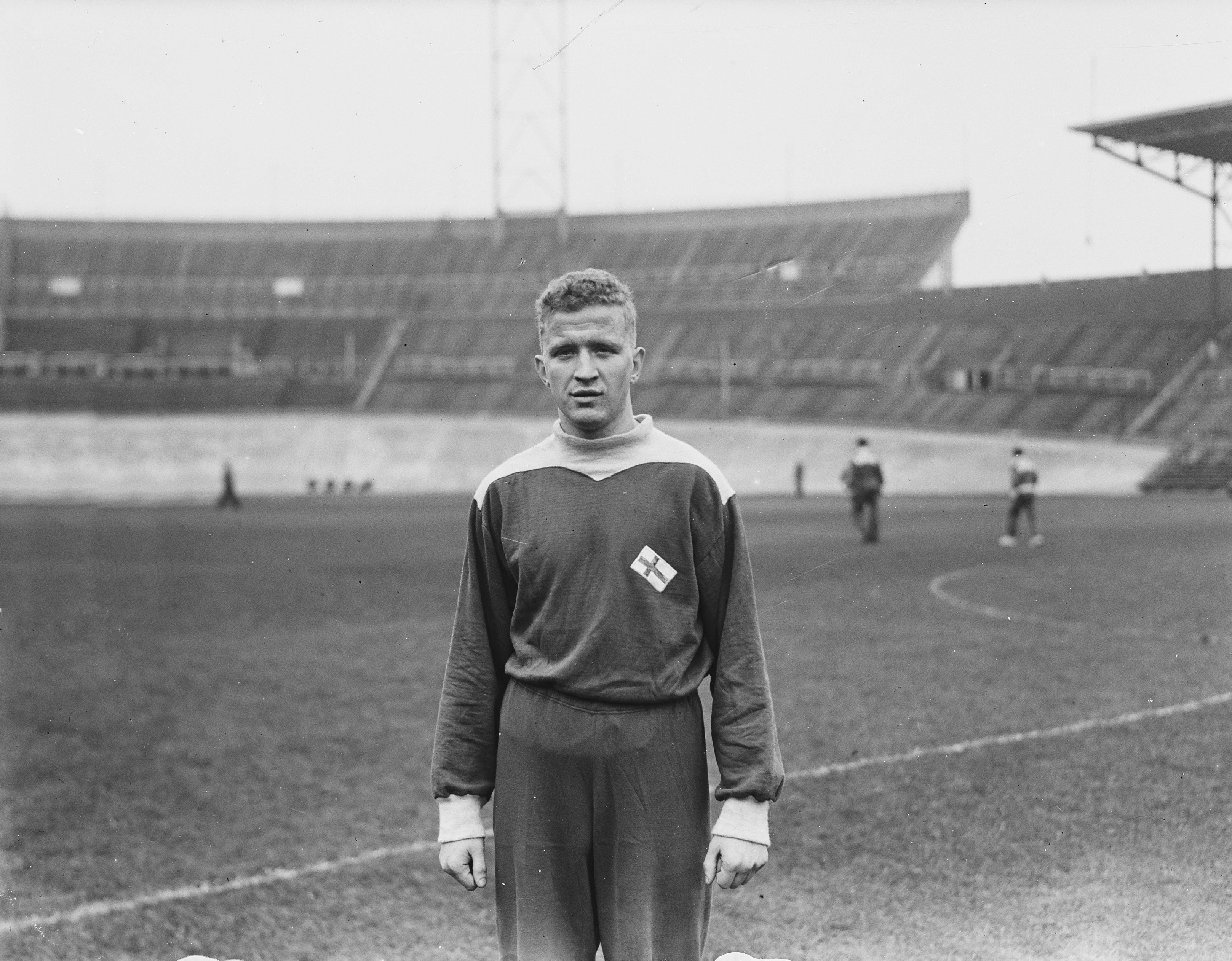 Collectie / Archief : Fotocollectie Anefo Reportage / Serie : [ onbekend ] Beschrijving : Seppo Pelkonen Datum : 26 oktober 1951 Fotograaf : Duinen, […] van / Anefo Auteursrechthebbende : Nationaal Archief Materiaalsoort : Glasnegatief Nummer archiefinventaris : bekijk toegang 2.24.01.09 Bestanddeelnummer : 904-8206